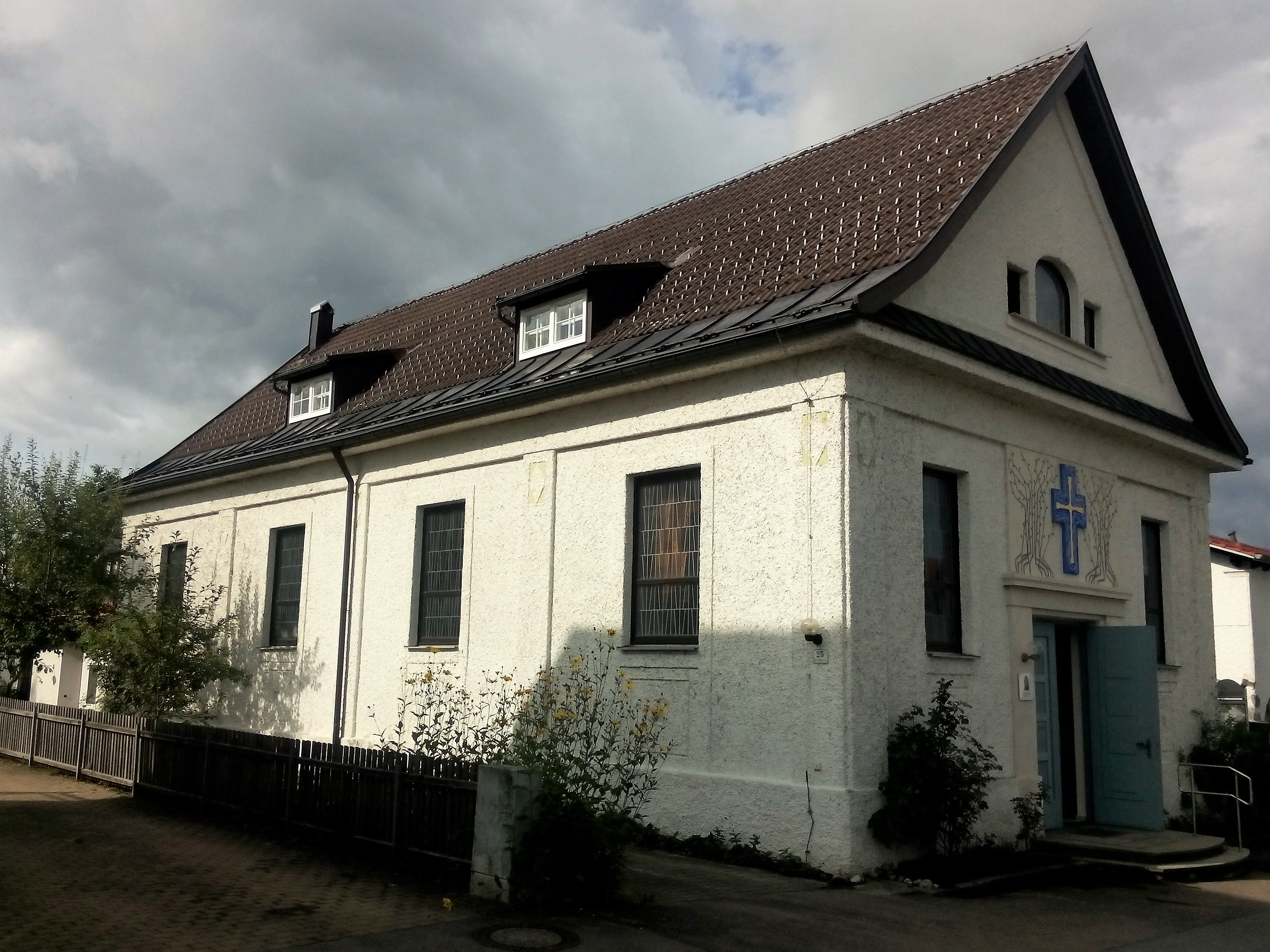 Evangelisch-Lutherische Kreuzkirche in Weiler im Allgäu